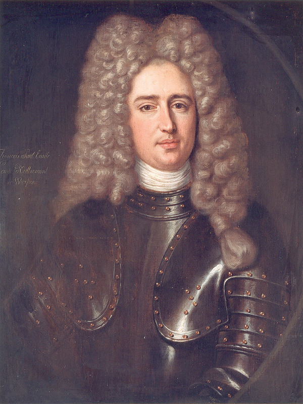 François-Paul-Emile, comte d'Oultremont de Warfusée, en armure